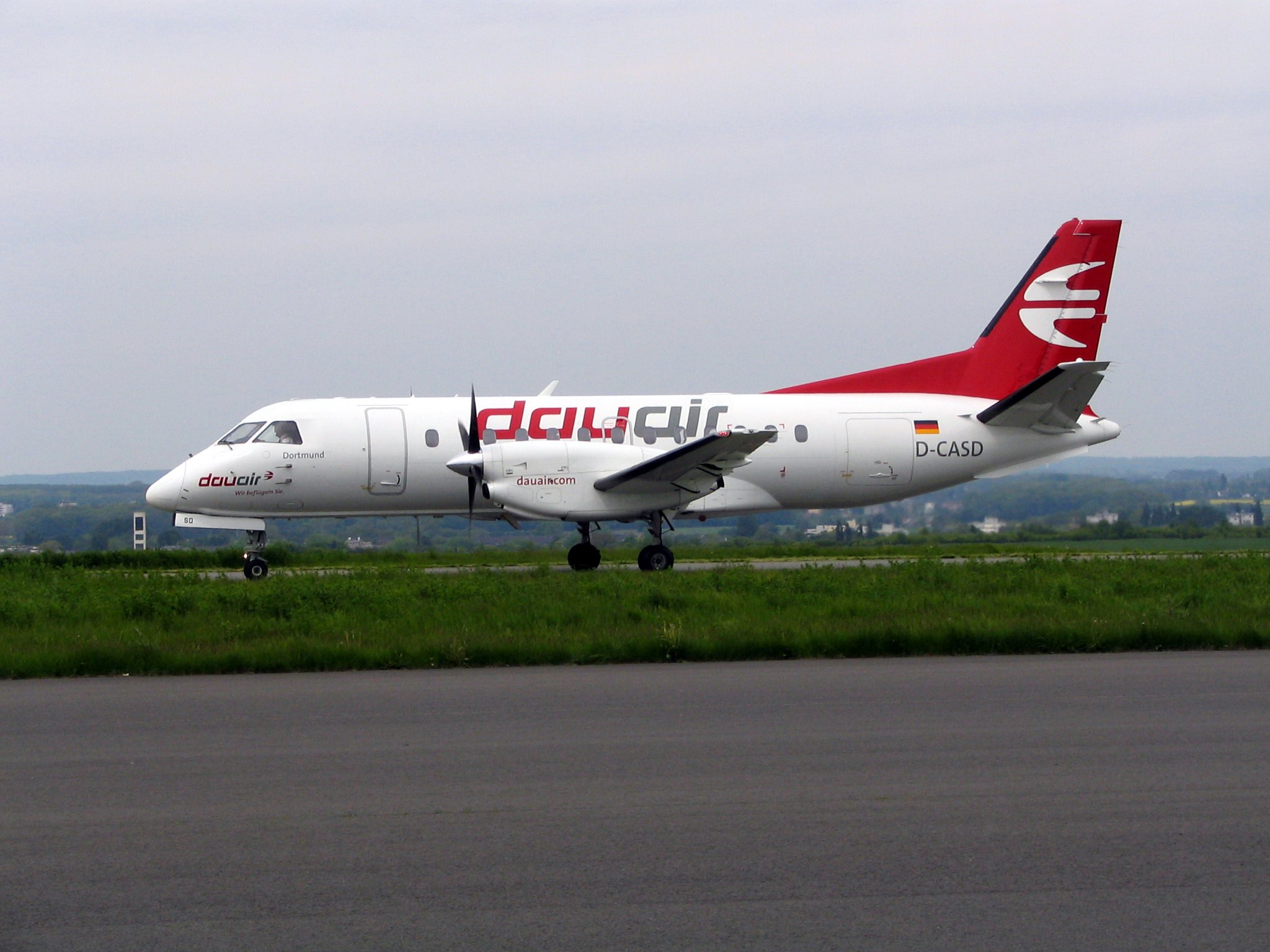 Saab 340 D-CASD "Dortmund" der dauair auf dem Flughafen Dortmund.